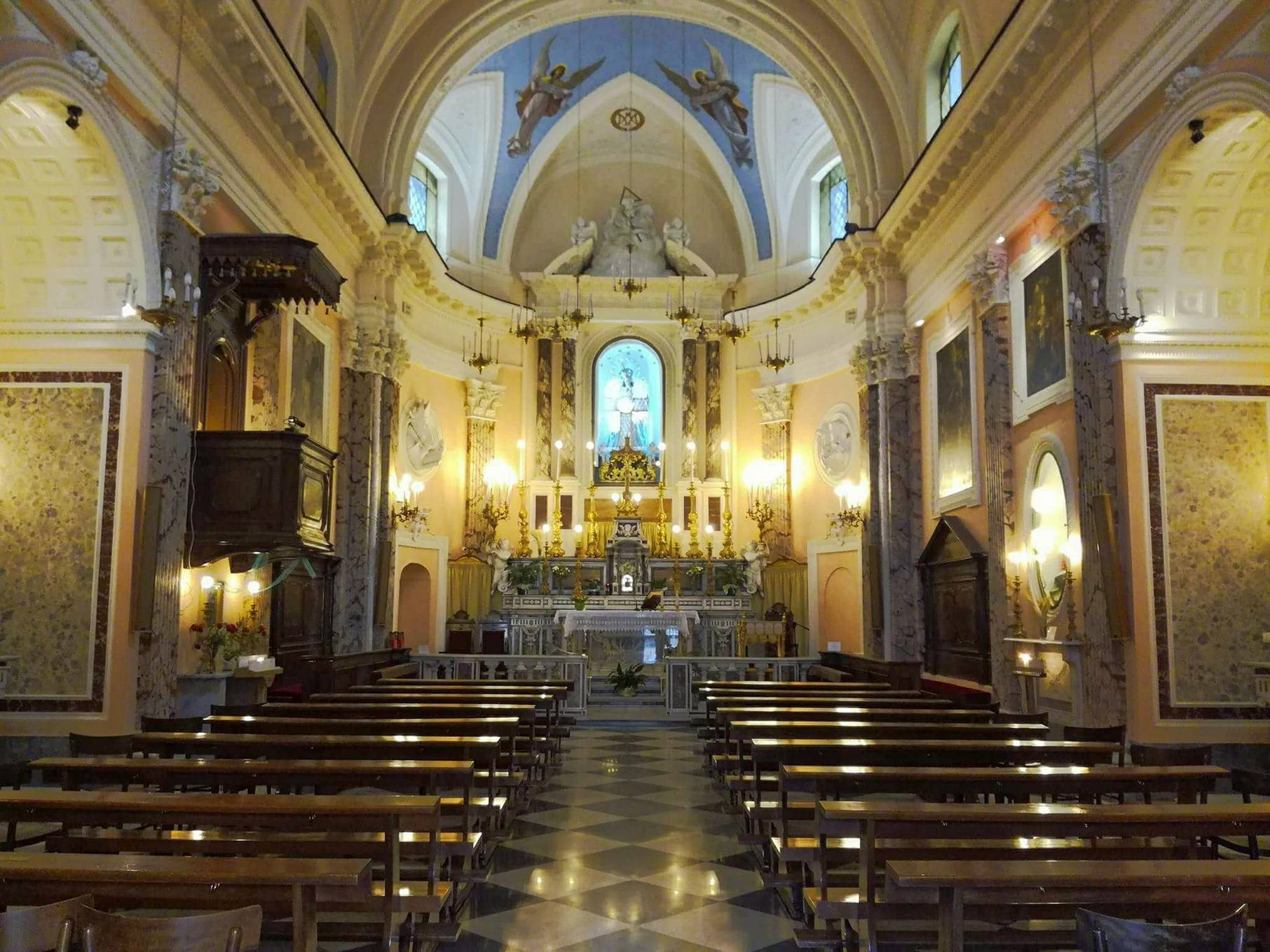 Interno Confraternita Soccorso